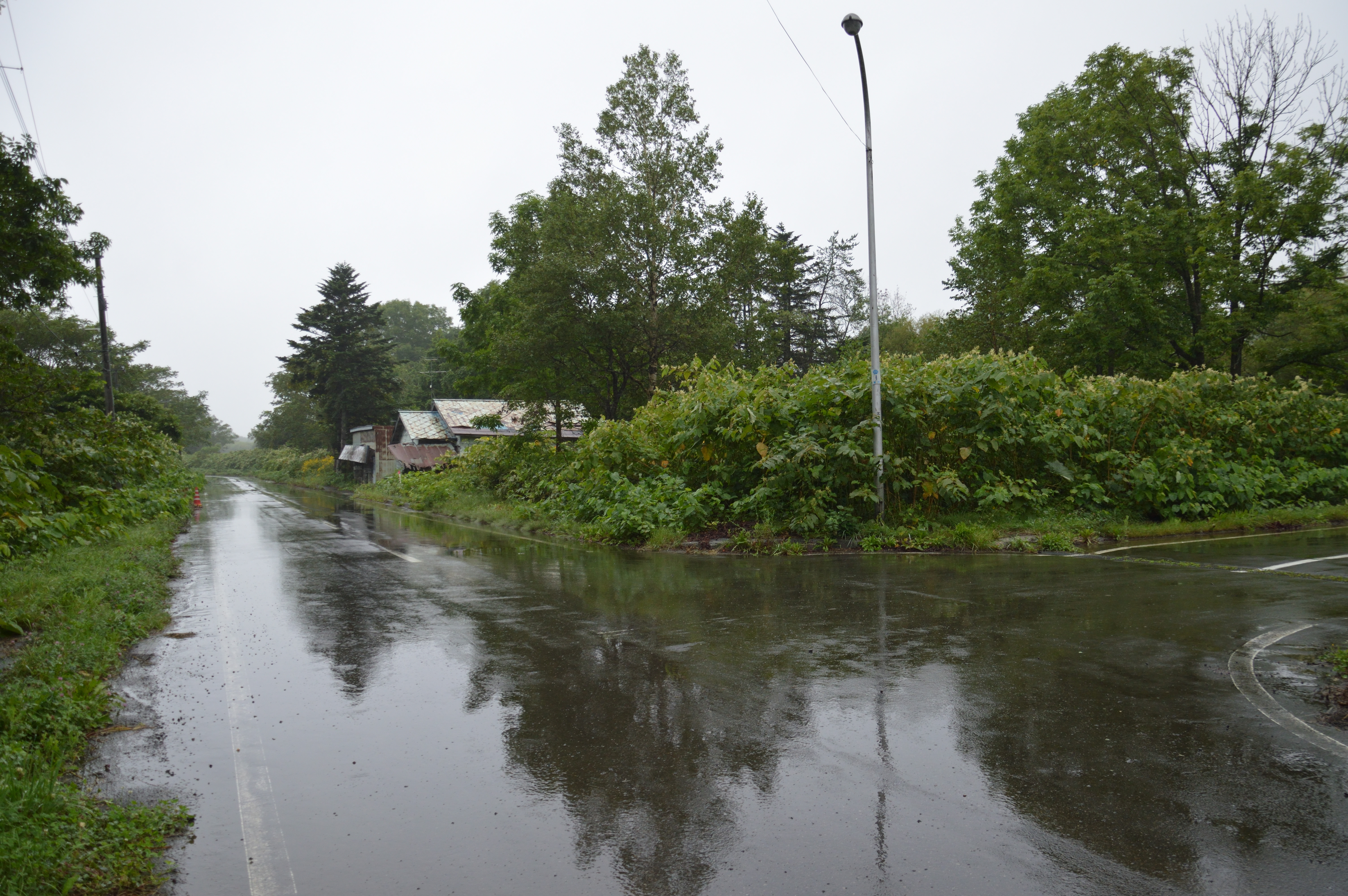 北海道道302号雄信内停車場線（幌延町雄興 終点付近） Nikon D3200